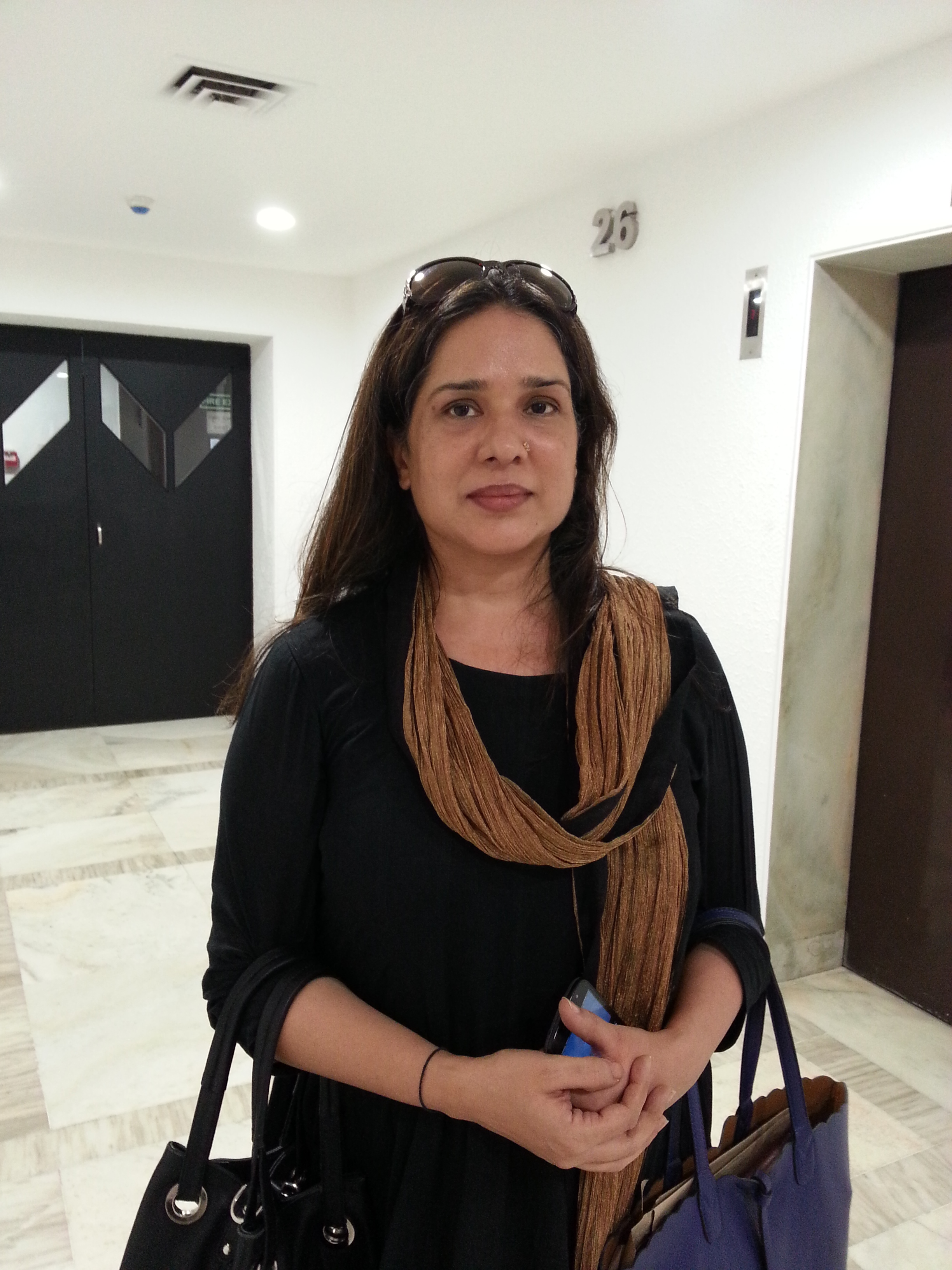 Manjari Chaturvedi is a famous Sufi Kathak dancer from India